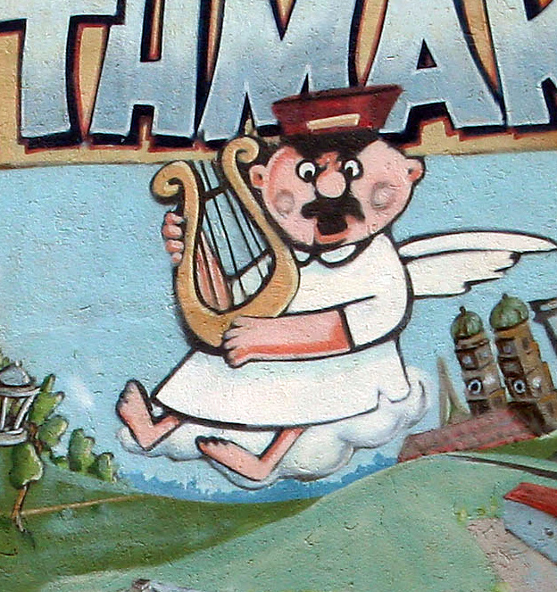 Engel Aloisius aus Ein Münchner im Himmel nach Ludwig Thoma, Zeichentrickfilm nach der Bearbeitung durch Adolf Gondrell. Ausschnitt eines Graffito an der Wand zum Elisabethmarkt in München.